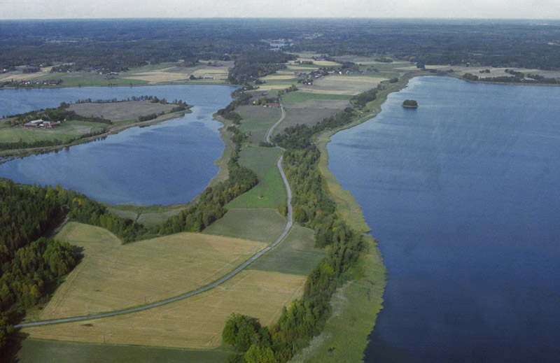 Blacksta by. Bilden är tagen mot (väderstreck): NV Motiv: Blacksta Nyckelord: Flygbilder, Riksintressen Kategori: Insjömiljöer, Jordbruksby Blacksta by. Bilden är tagen mot (väderstreck): NV.